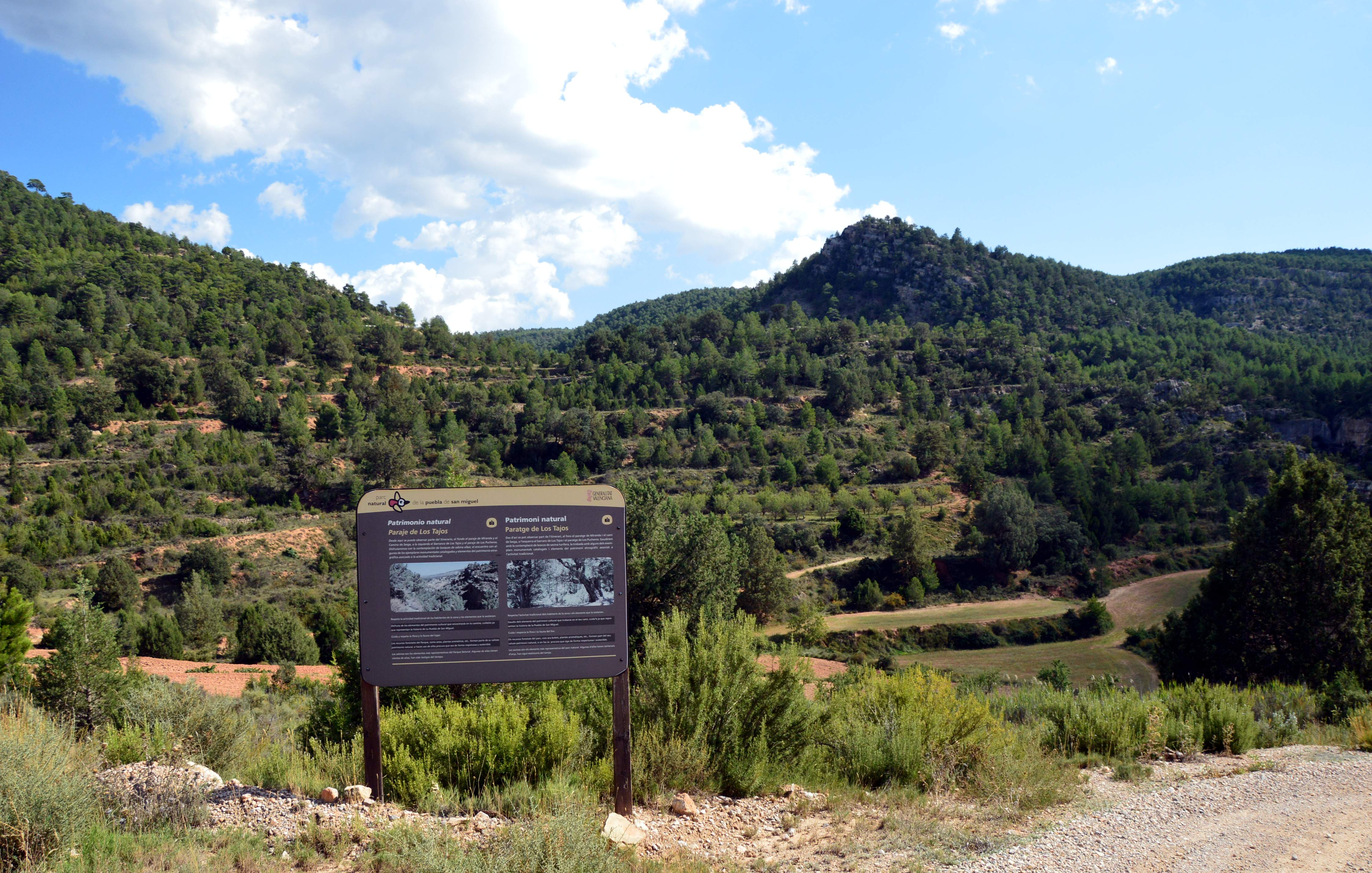 Paisaje en el Camino de Sesga, Parque Natural de la Puebla de San Miguel (Valencia), 2018.